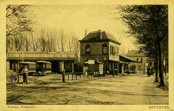 Tramstation Deventer-Pothoofd 1916 Geldersch-Overijsselsche Trammaatschappij. Buiten gebruik gesteld in 1926 en gesloopt na 1982.